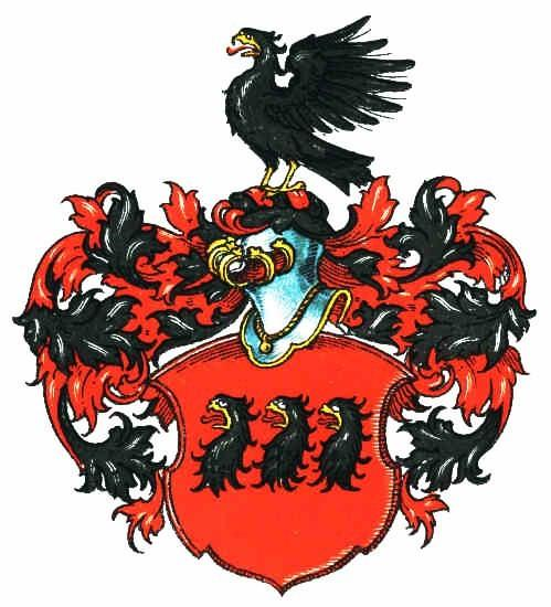 Wappen der Klinckowström, seit 17. Jh. schwedisch-pommersches Adelsgeschlecht, die Vorfahren lebten unter dem Namen Klinkow oder Klinckow in Stralsund und stammten möglicherweise aus dem gleichnamigen Ort bei Prenzlau, wo bereits 1320 die Brüder Peter und Johann de Klinkow, Bürger und Burglehnbesitzer in der Stadt Prenzlau, der örtlichen Nikolaikirche einen Altar stifteten.